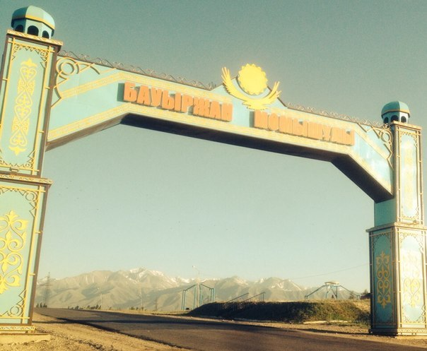 Қазақша (кирил): Жуалы жер жаннаты